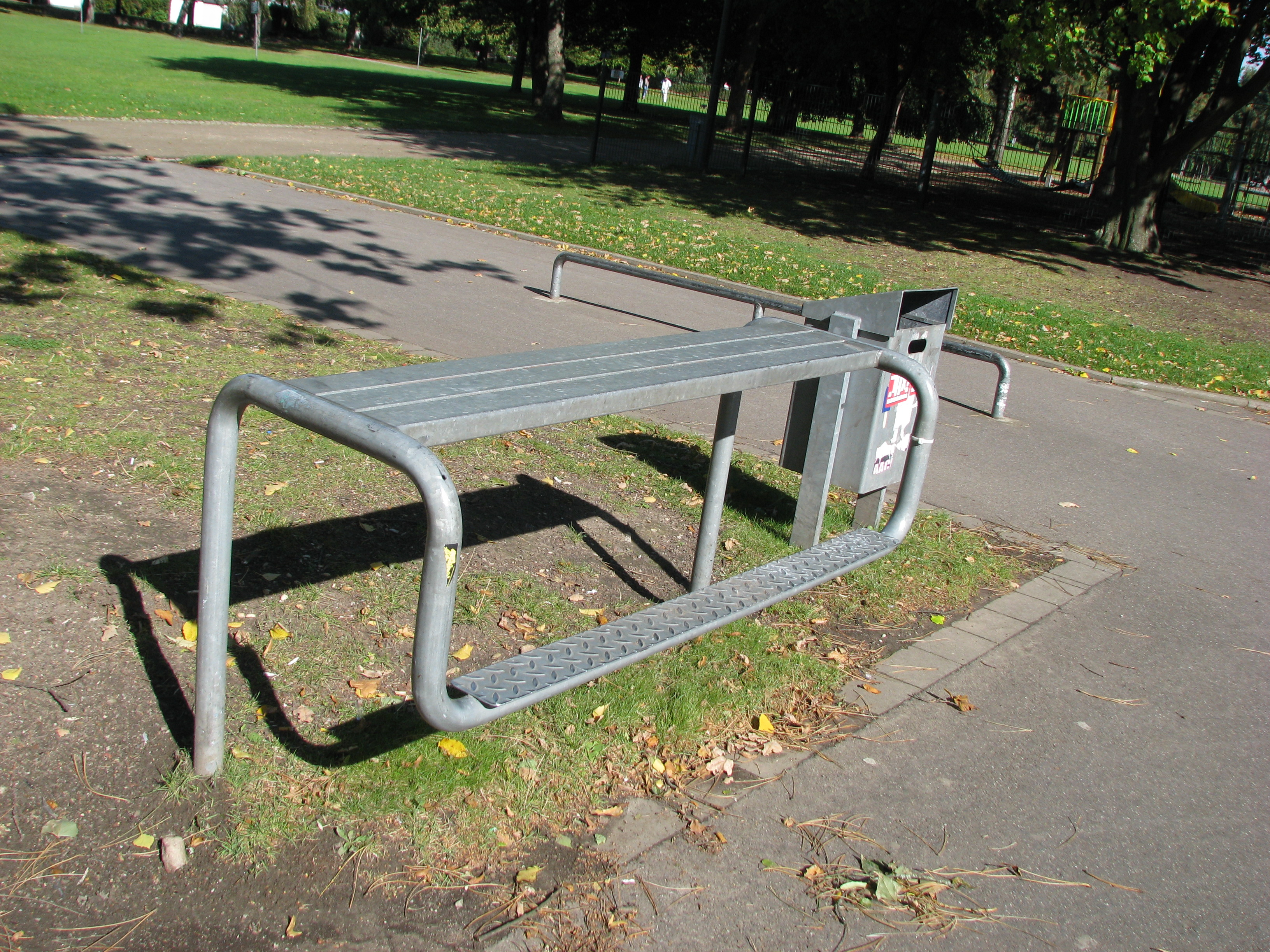 Parkbank für junge Leute im Kennedypark in Aachen